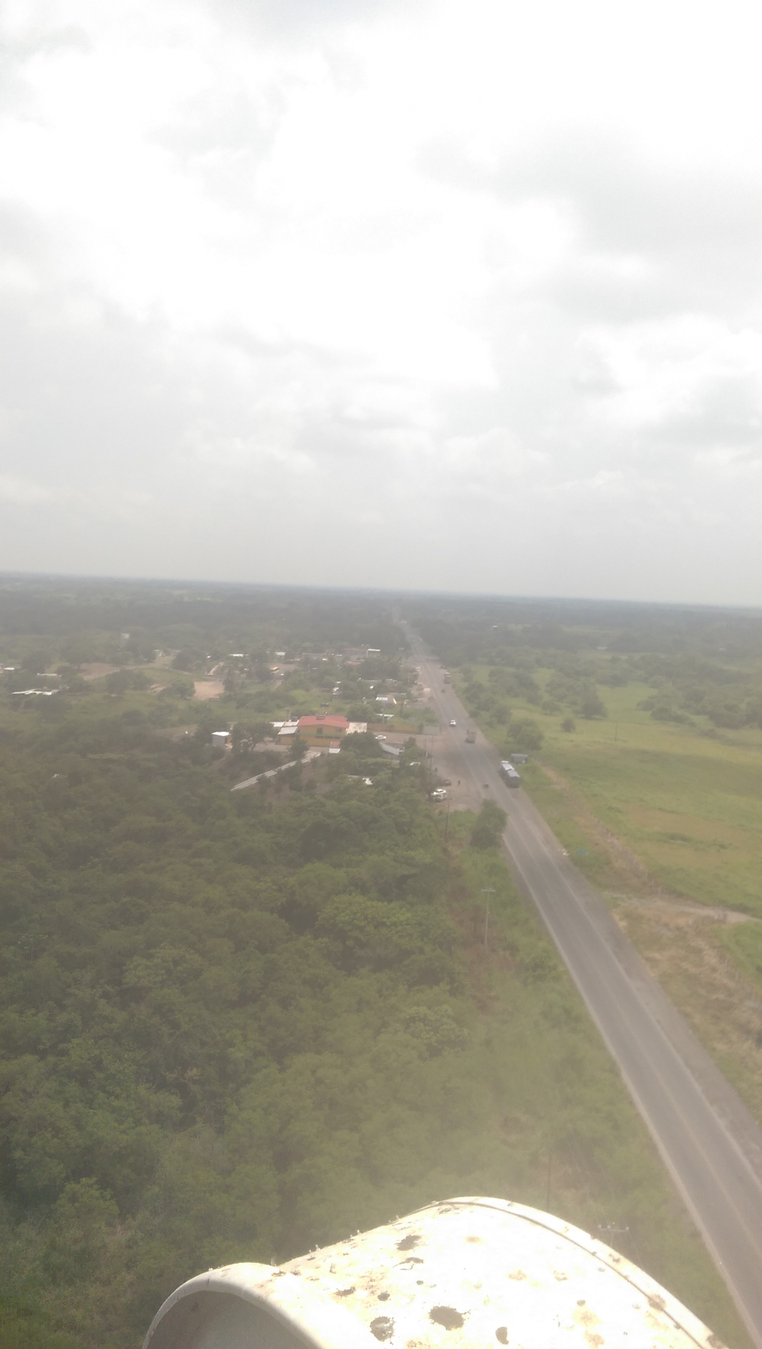 Entronque de la carretera 150 tramo Córdoba - La Boticaria Km 60, con la autopista 150D, tramo Córdoba - Veracruz, visto desde 42 mts de altura a una distancia de 500 mts aprox.